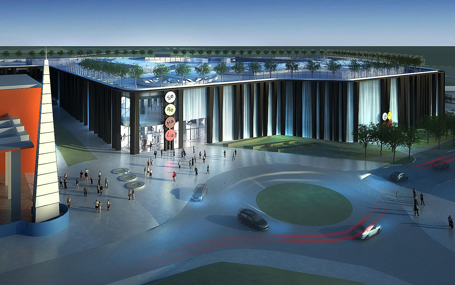 Centrum handlowo - usługowe na Olszy w Krakowie